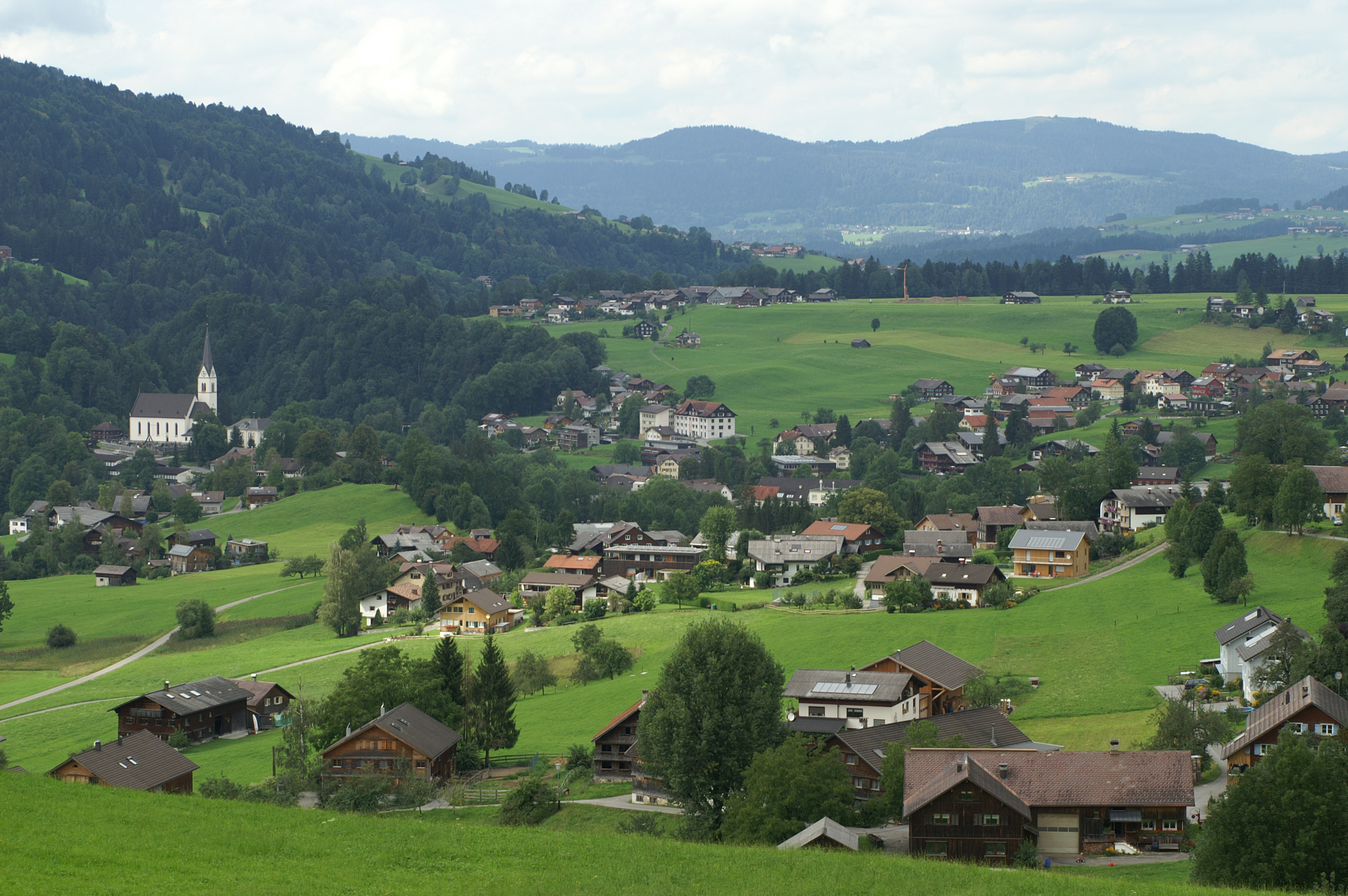 Gemeinde Egg (Vorarlberg), Vorarlberg